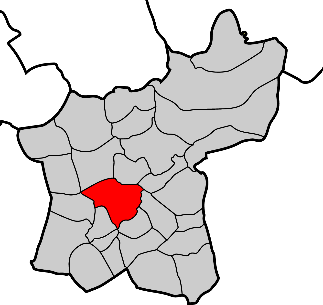 Mapa parroquia de Pousada Baralla